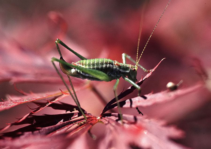 Leptophyes albovittata female, Brežice, Slovenia. Author: Blaž Šegula